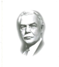 Photo de mon album personnel